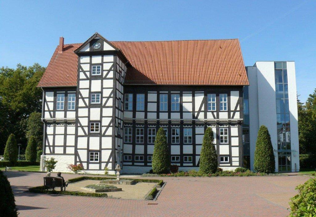 Rinteln, Prinzenhof in der Klosterstraße